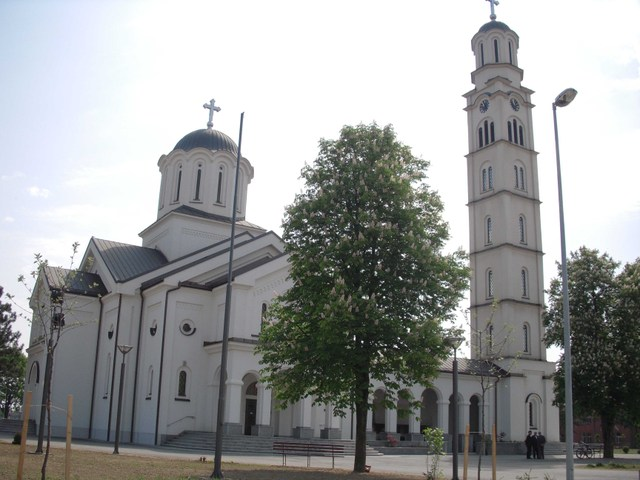 Katedrální chrám ve městě Bijeljina, BiH